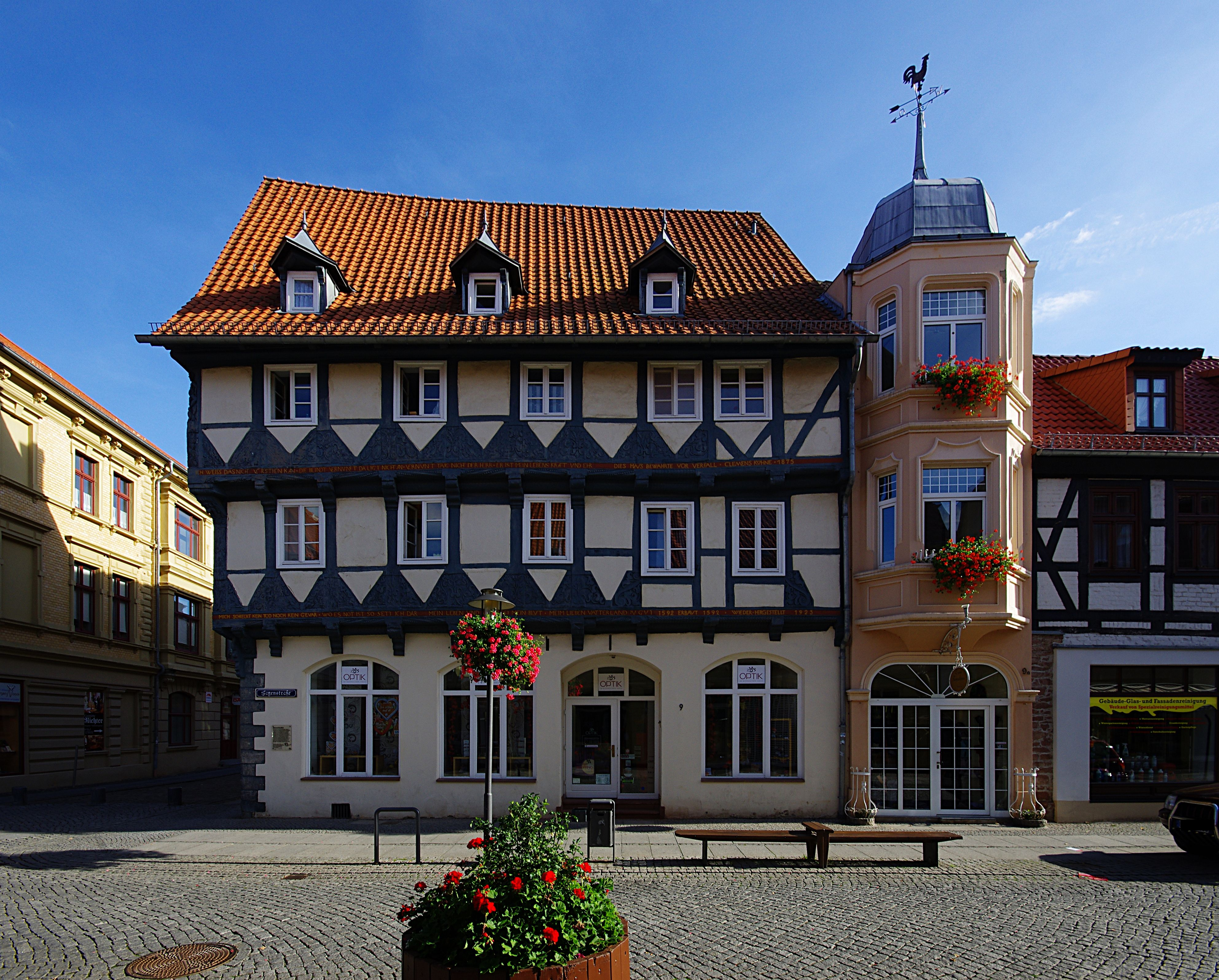 Haldensleben in Sachsen-Anhalt. Das Haus in der Fußgängerzone Hagenstraße steht unter Denkmalschutz. Das Fachwerkhaus ist die Nummer 9, das schmale Haus daneben die Nummer 9a. Das Haus wird auch als das Kühnsches Haus bezeichnet.